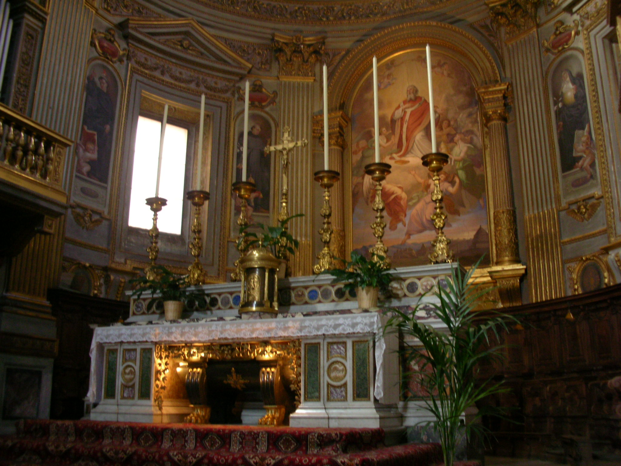 Main Altar, San Marcello al Corso, Rome